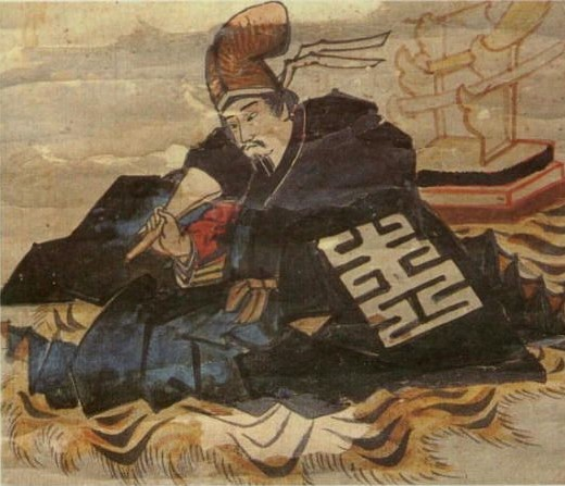 赤沢宗伝の肖像。